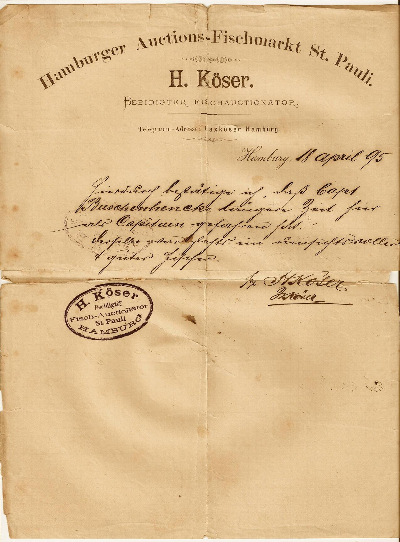 Am 18. April 1895 stelle Johann Hinrich Köser dieses Zeugnis für einen seiner Kapitäne aus.